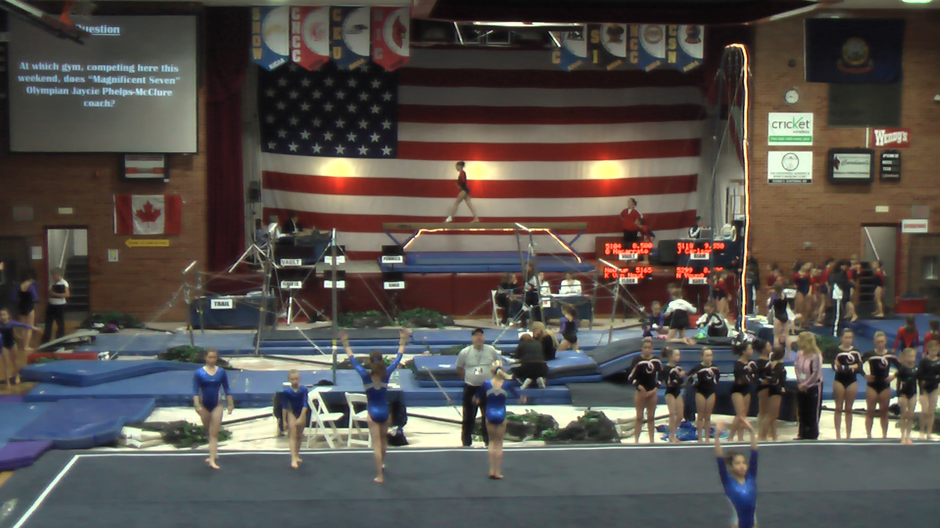 Great West Gym Fest 2008.